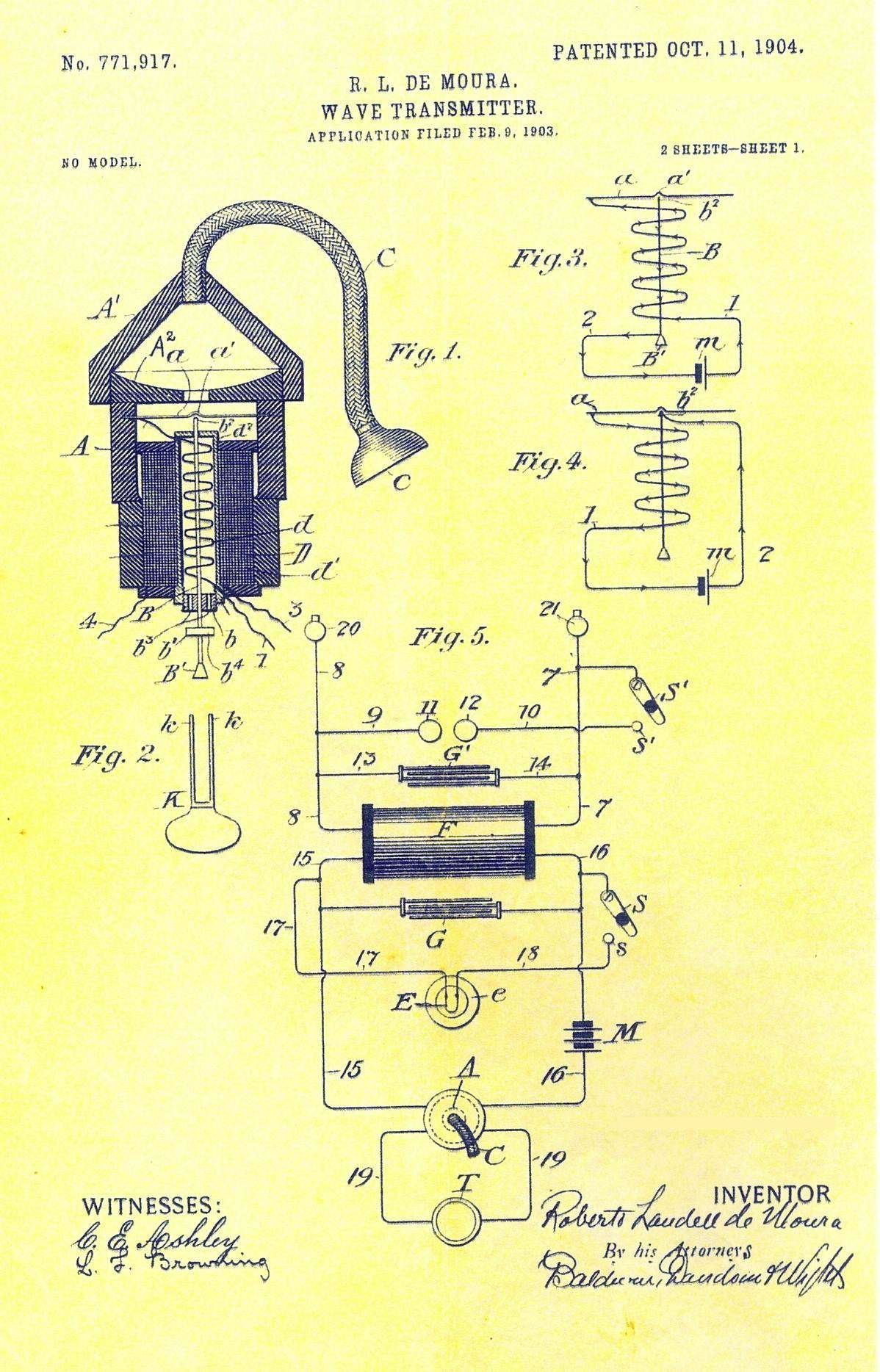 Esquema Elétrico do Transmissor de Ondas - "Wave Transmitter" - Patente obtida em 1904 no Departamento de Patentes dos Estados Unidos.